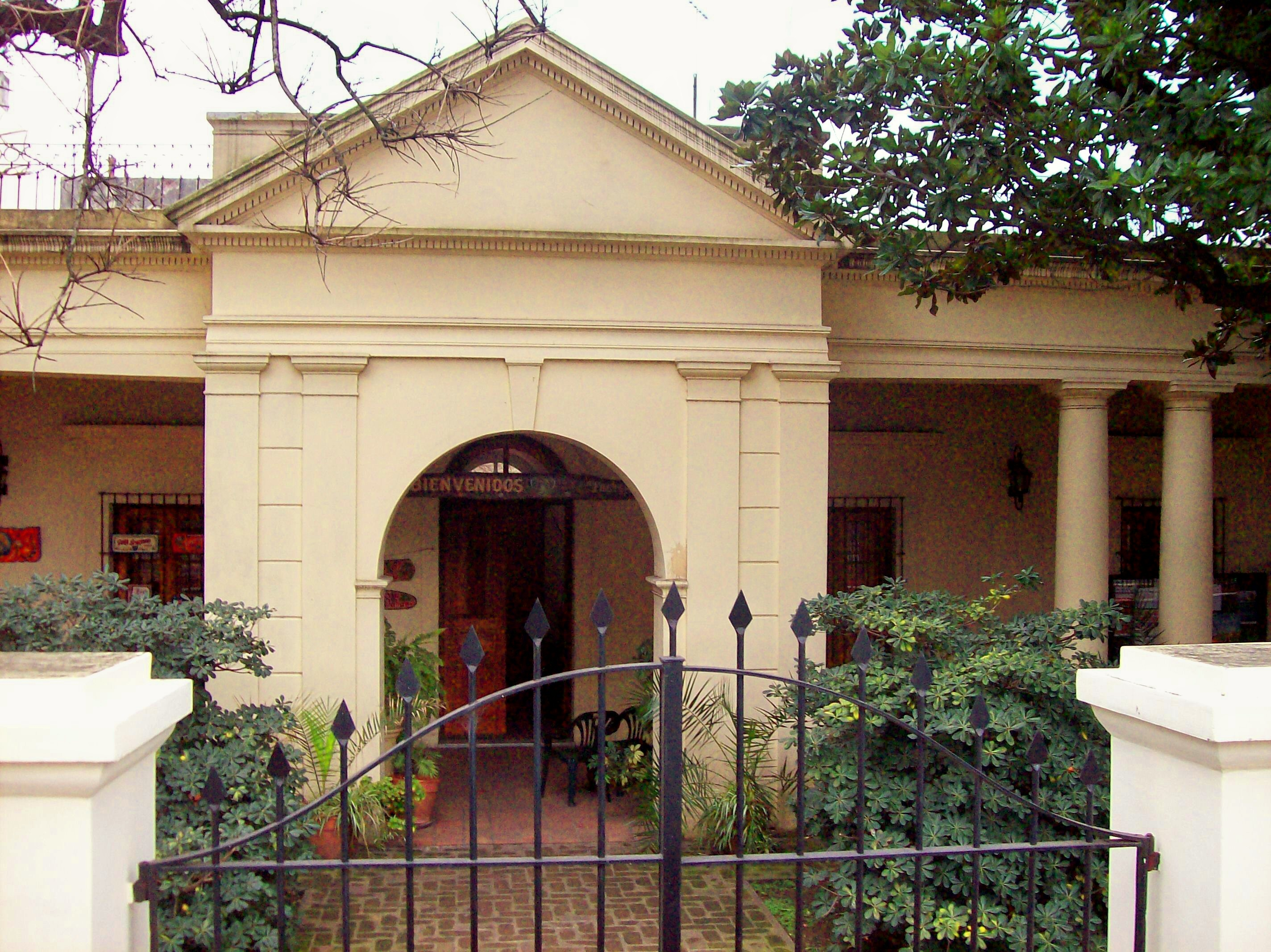 Centro Cultural Marcó del Pont, entrada. En calle Gervasio Artigas 202, barrio de Flores, Buenos Aires, Argentina. Foto tomada desde la estación de tren "Flores", de SE a NO